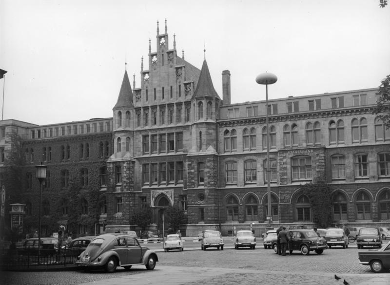 Stadtaufnahmen von Braunschweig Information added by Wikimedia users.